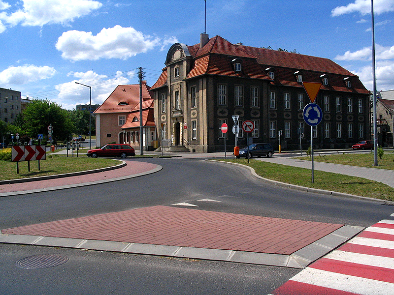 Rondo Solidarności i Sąd Rejonowy w Gostyniu.